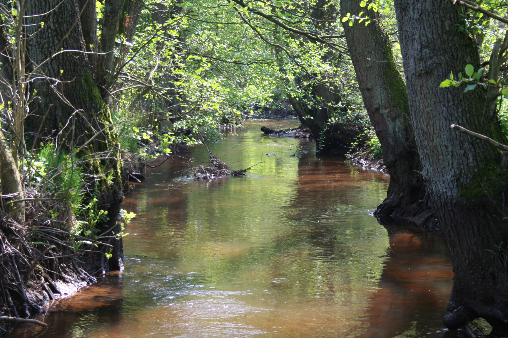 Erlengesäumter, naturnaher Abschnitt der Veerse bei Westervesede